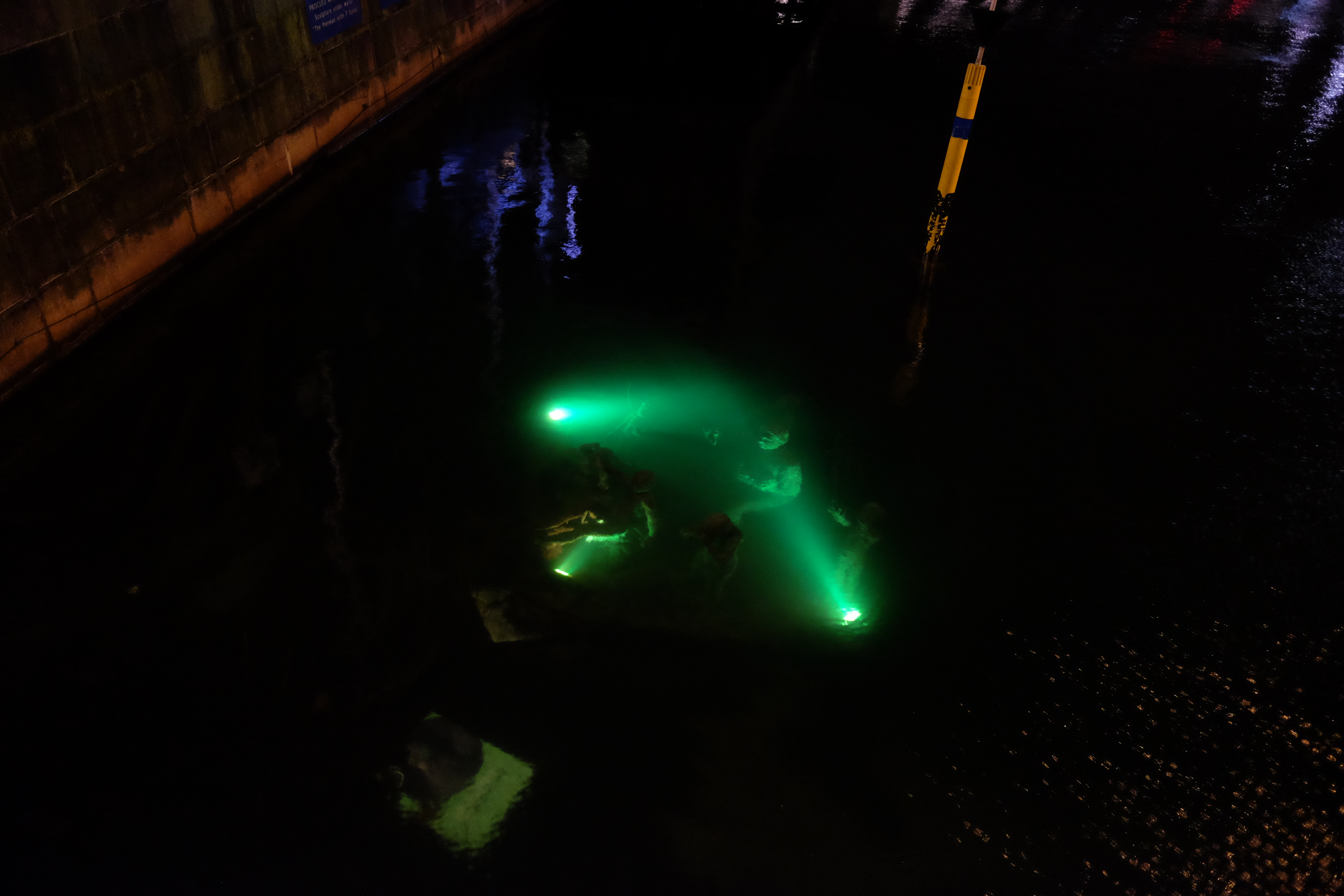 Agnete og Havmanden, skulptur av Suste Bonnén i Slotsholmens kanal, bredvid Højbro, Köpenhamn.